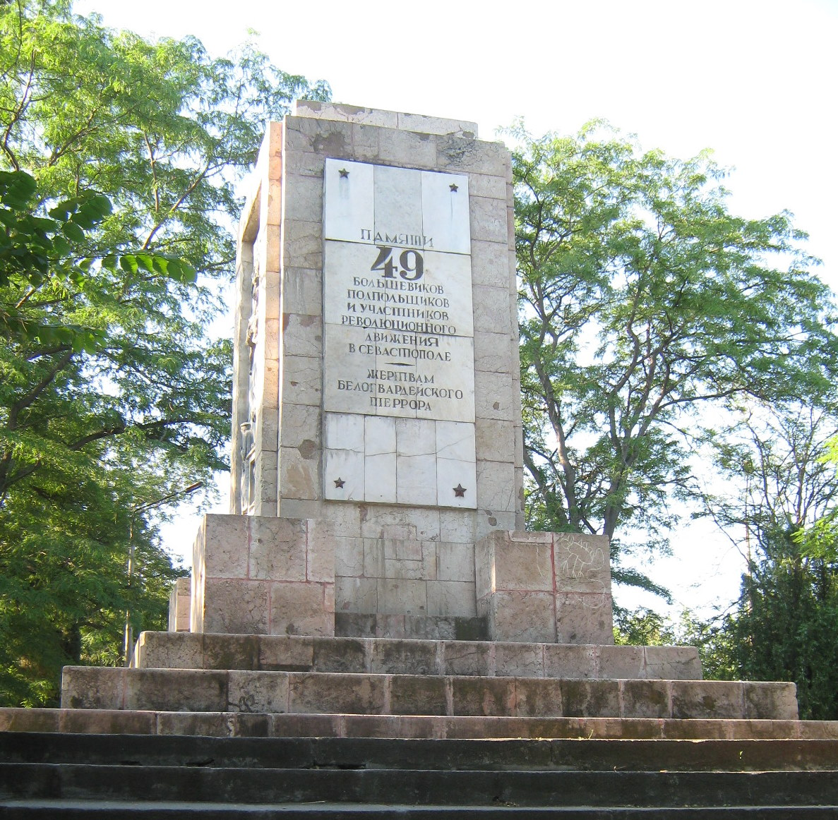 Пам'ятник 49 комунарам. Встановлений в 1937 році